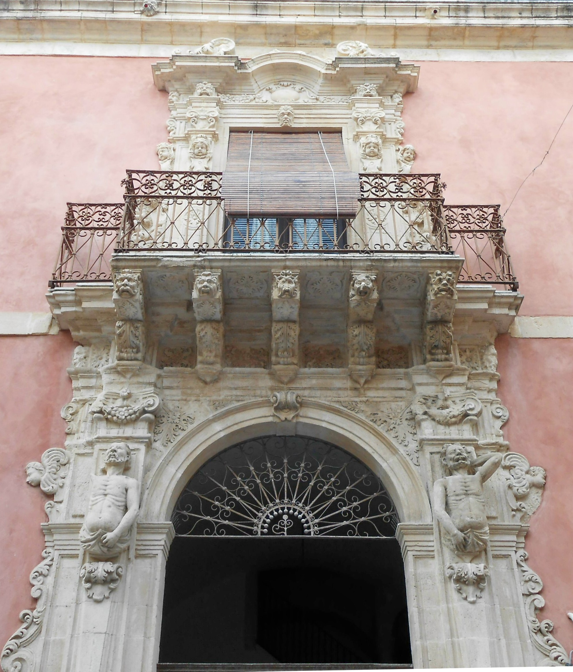 Palazzo Niceforo (sec. XVIII) in via G. B. Baldanza a Militello (CT).